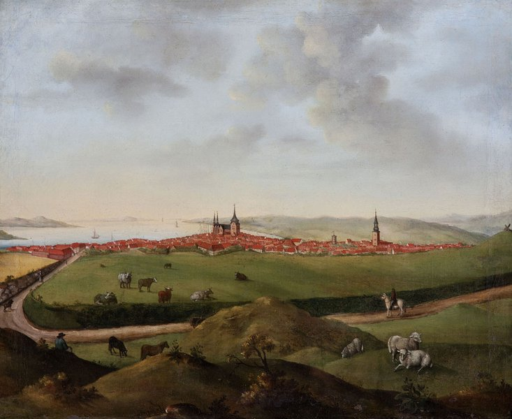 Udsigt over Aarhus fra nordvest med Randers landevej